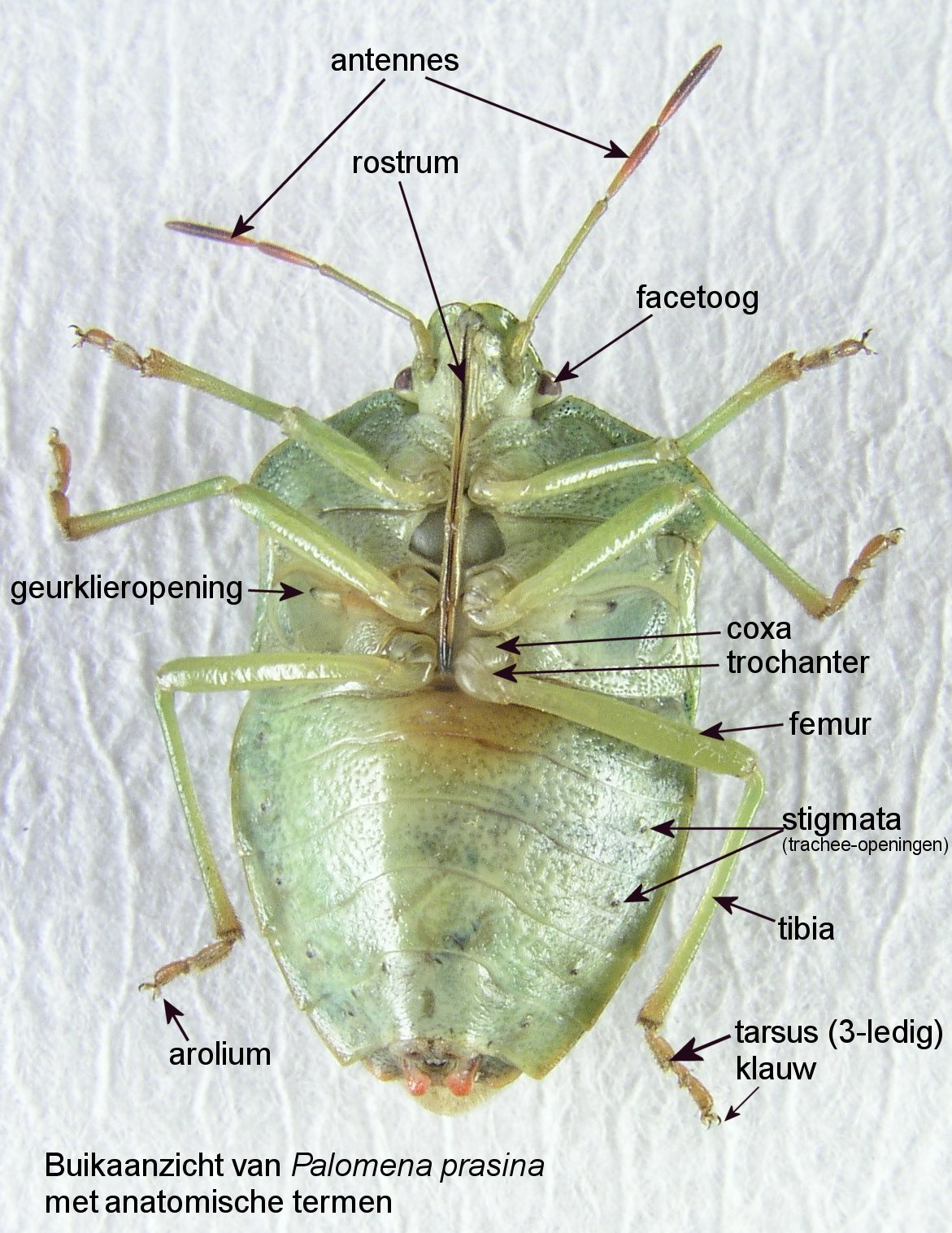 eigengemaakte illustratie van de anatomie van een wants, ventraal